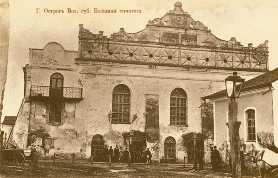 Велика синагога в Острозі. Поштівка. 1904 рік.